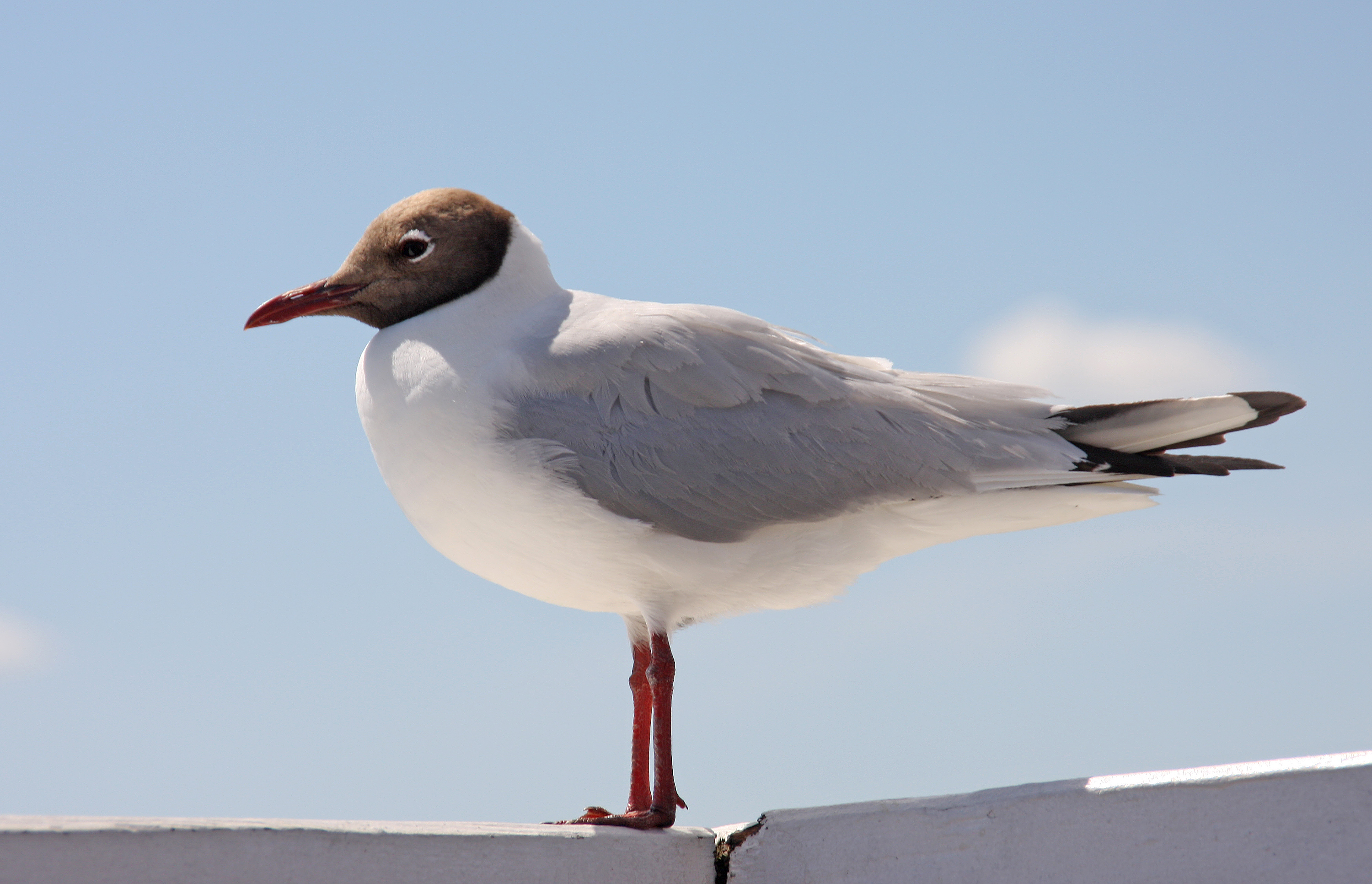 Lachmöwe an der Mole von Sopot in Polen